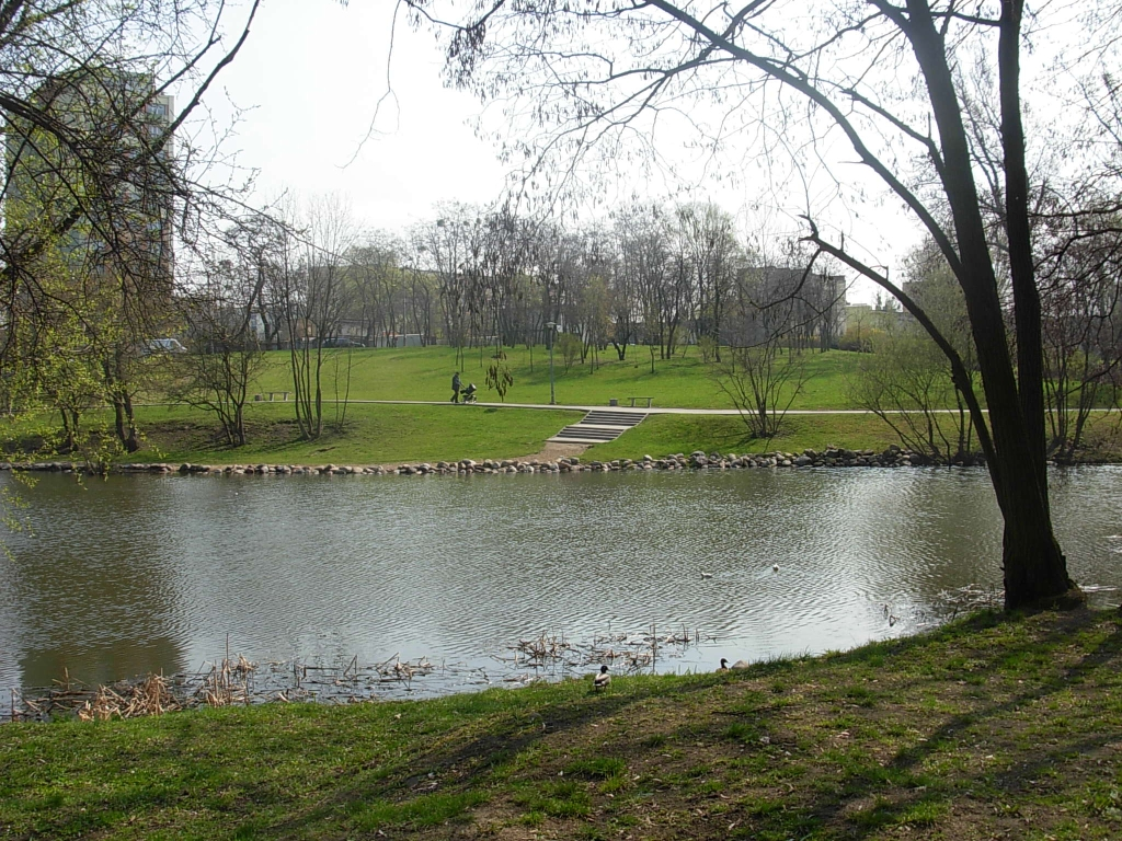 Park Dolina Pięciu Stawów w Bydgoszczy